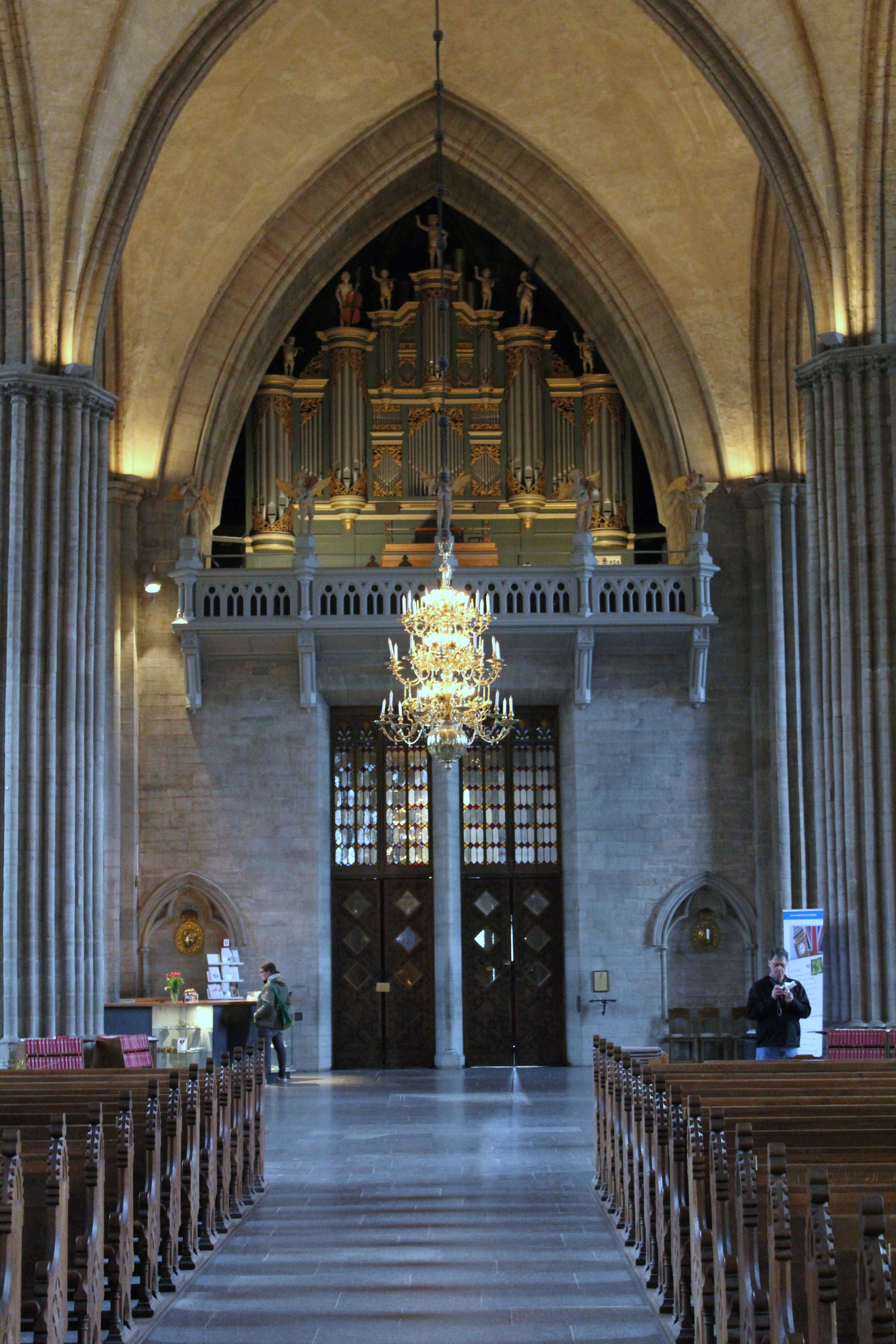 Linköpings domkyrka. Interiör mot orgeln.